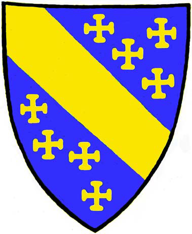 Wappen der Ministerialenfamilie Ehrenberg von der Ehrenburg (Mosel)